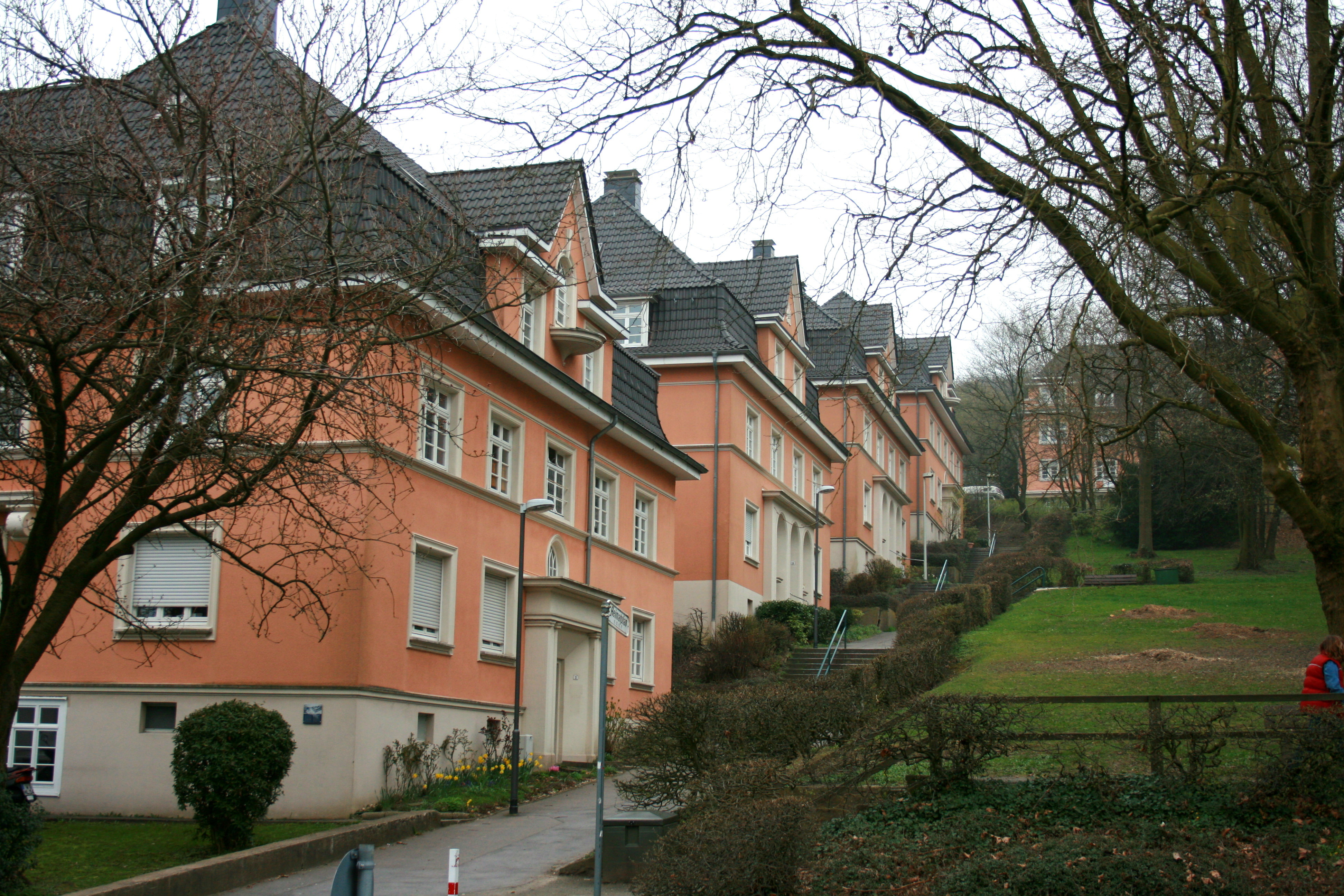 Siedlung Heimat in Wuppertal: Heimatplan Nr. 11, 13, 15 und 17